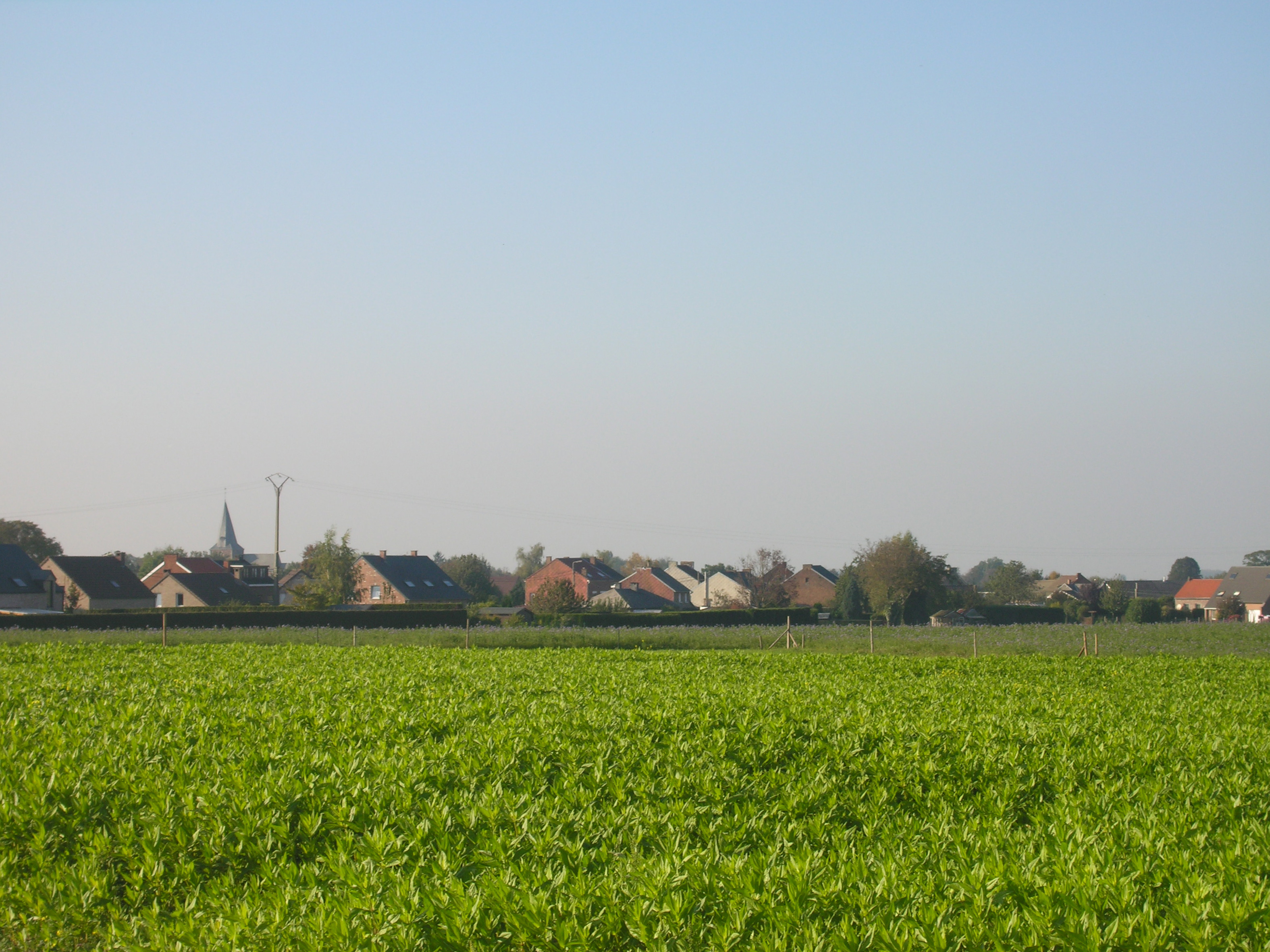 Momalle (Remicourt) (Belgium)The villagele villageel poblehet dorp